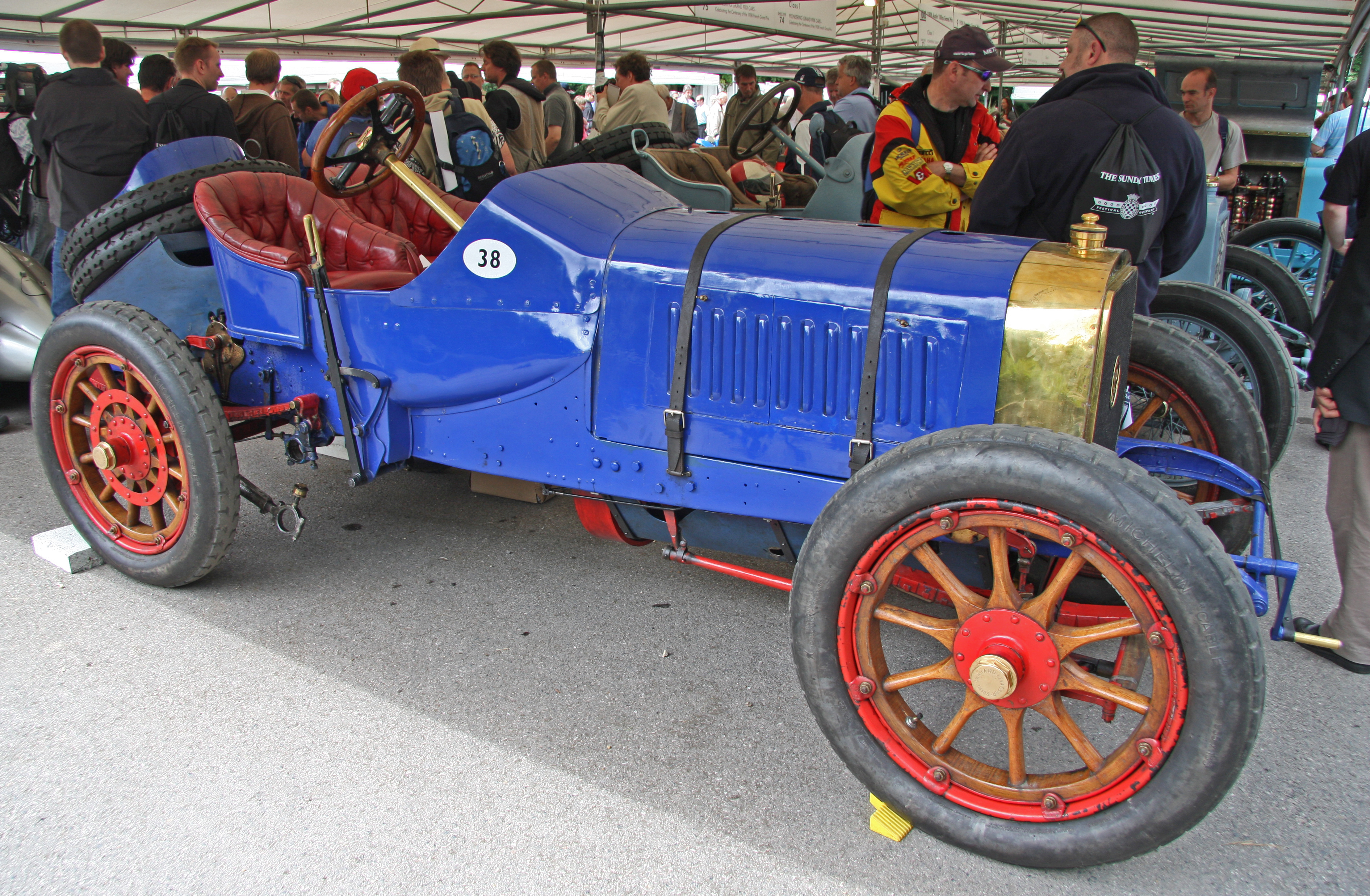 Built 1908. 13 litre 4 cylinder